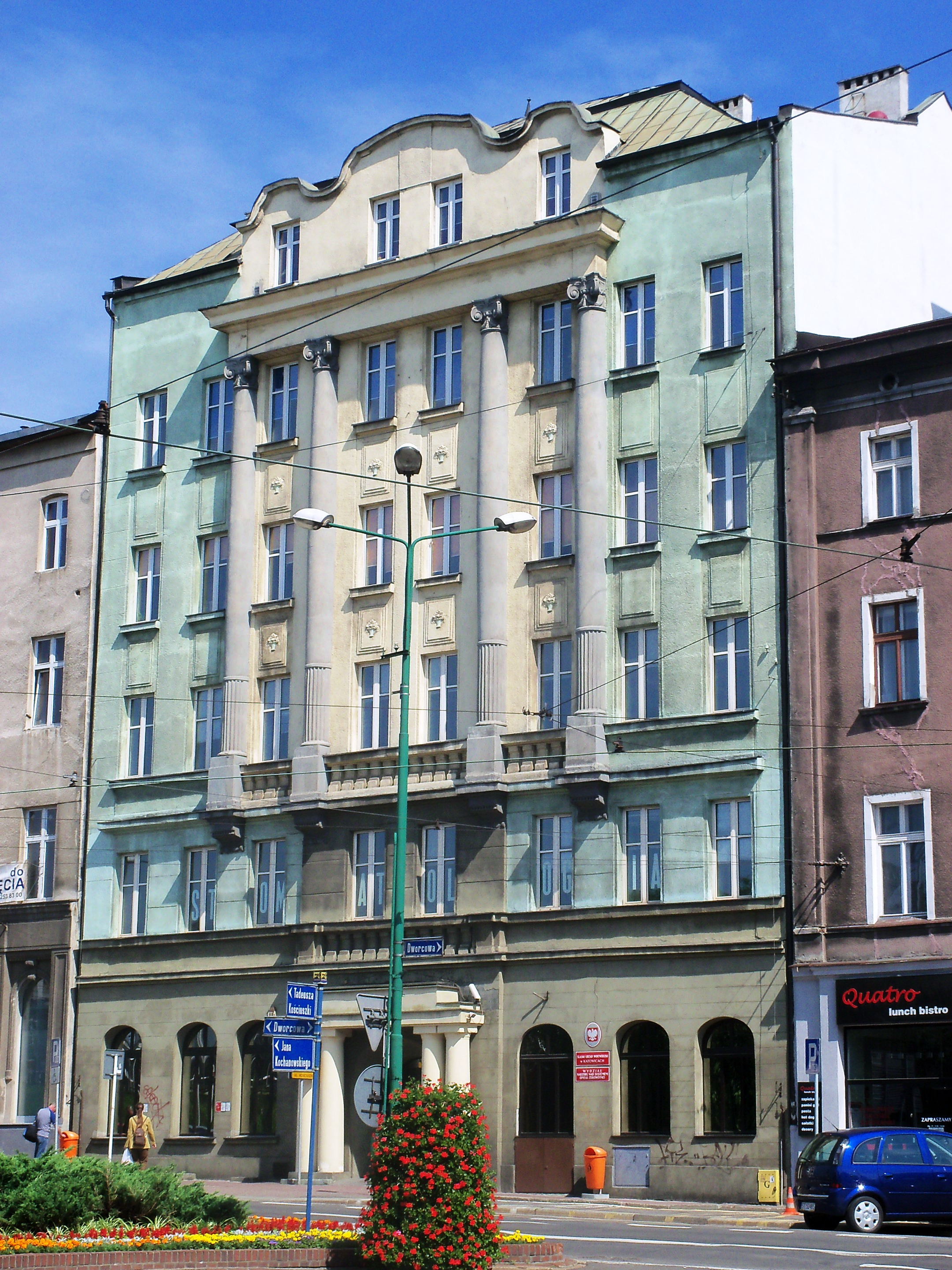 Budynek przy ul. Dworcowej 17 w Katowicach